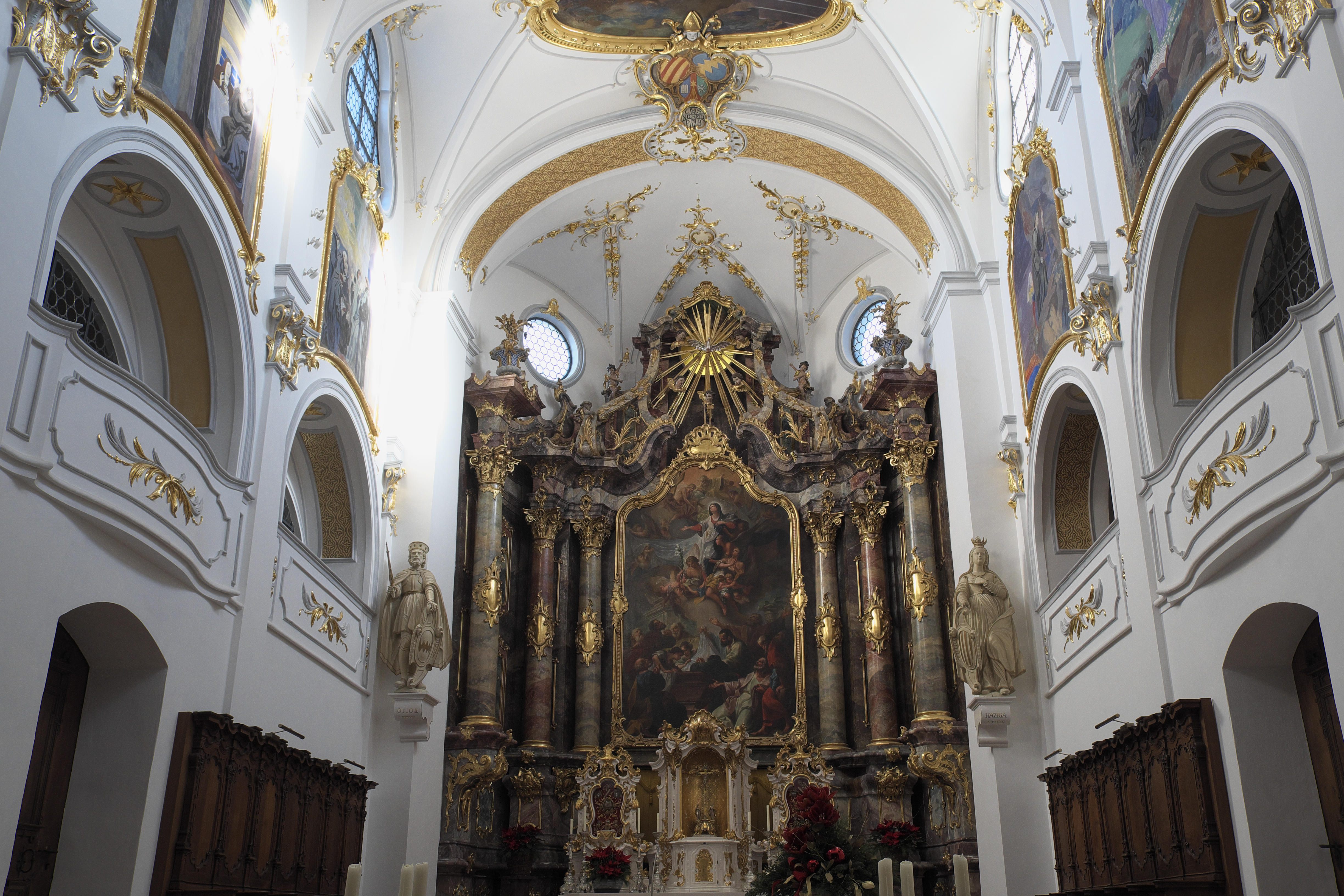 Katholische Pfarr- und Benediktinerabteikirche Mariä Himmelfahrt und des Heiligen Kreuzes des Klosters Scheyern in Scheyern im Landkreis Pfaffenhofen an der Ilm (Bayern/Deutschland), Chor und Hochaltar